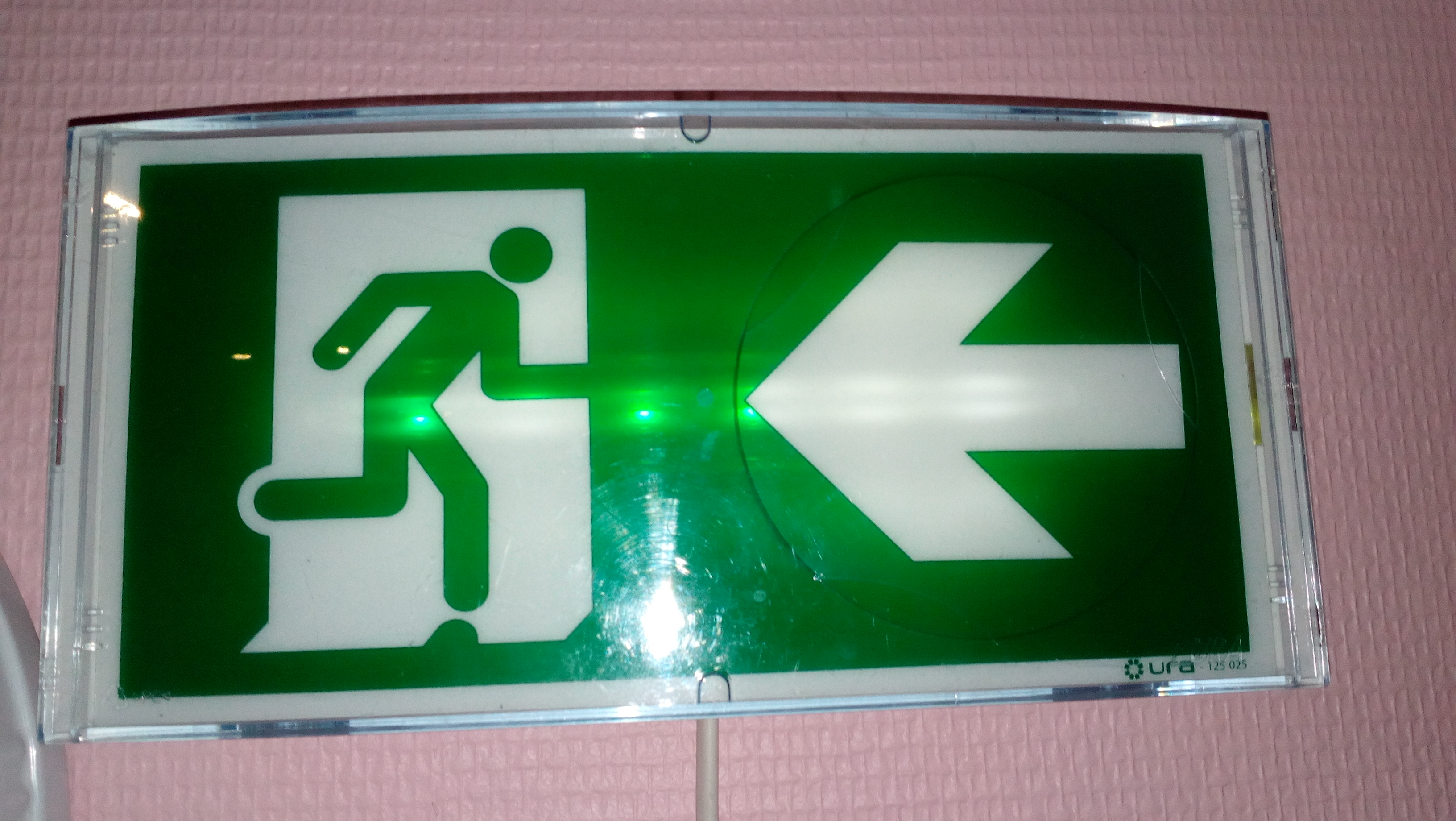 Un BAES d'évacuation (Bloc Autonome d'Éclairage de Sécurité) URA modèle URALIFE 118 218. Ce BAES utilise des diodes electro-luminescentes (DEL) au lieu d'une ampoule à filament. On remarquera que la flèche peut être orientée (ici vers la gauche) mais aussi le témoin lumineux (dispositif SATI). Le témoin lumineux (dispositif SATI) correspond à un dispositif d'auto-test intégré au BAES. La plupart des BAES tendent à être remplacés par un BAES avec un dispositif SATI. Les codes d'erreur sont les suivants : 1. LED Verte Clignotante : Charge batterie, sous tension 2. LED Verte Fixe : Sous tension, batterie Chargée 3. LED Orange/Jaune Fixe et LED Verte éteinte : Défaut batterie 4. LED Orange/Jaune clignotante et LED Verte éteinte : Défaut général : Remplacer le bloc